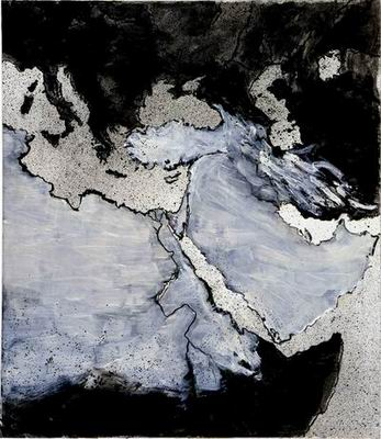 Painting